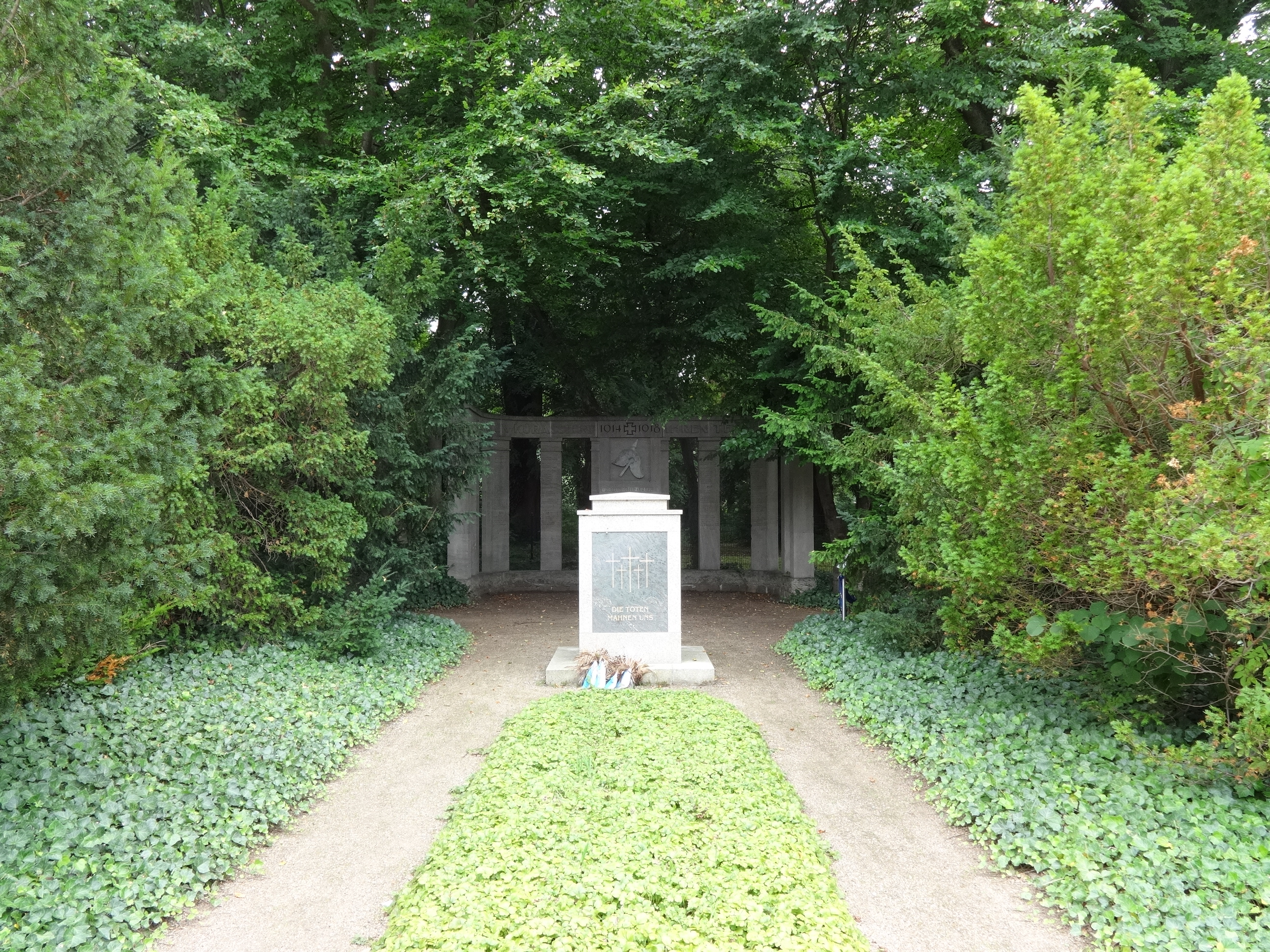 Denkmal für die im Ersten Weltkrieg gefallenen Kürassiere Pasewalks von 1922